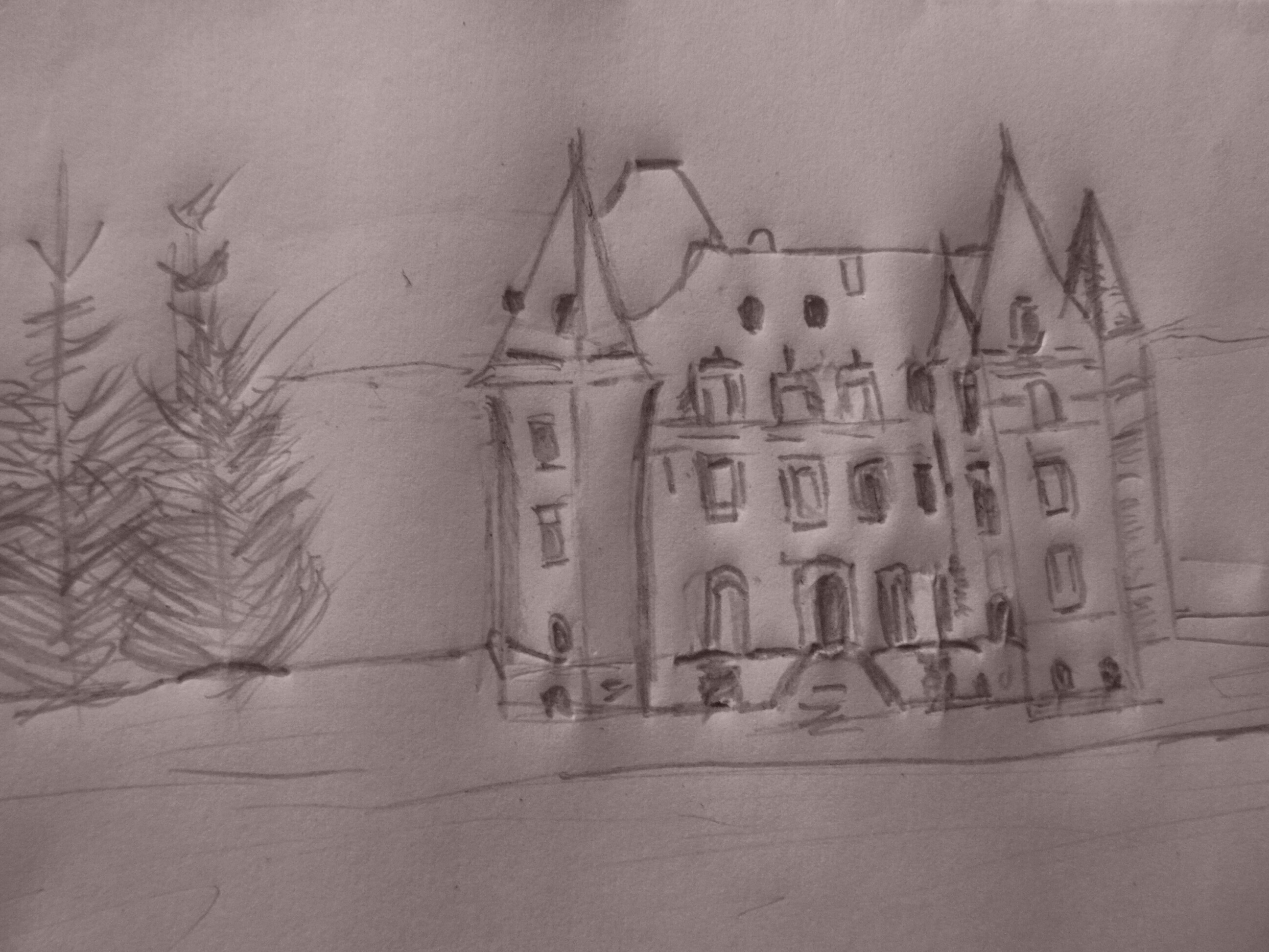 Château d'Aboville (dessin personnel)